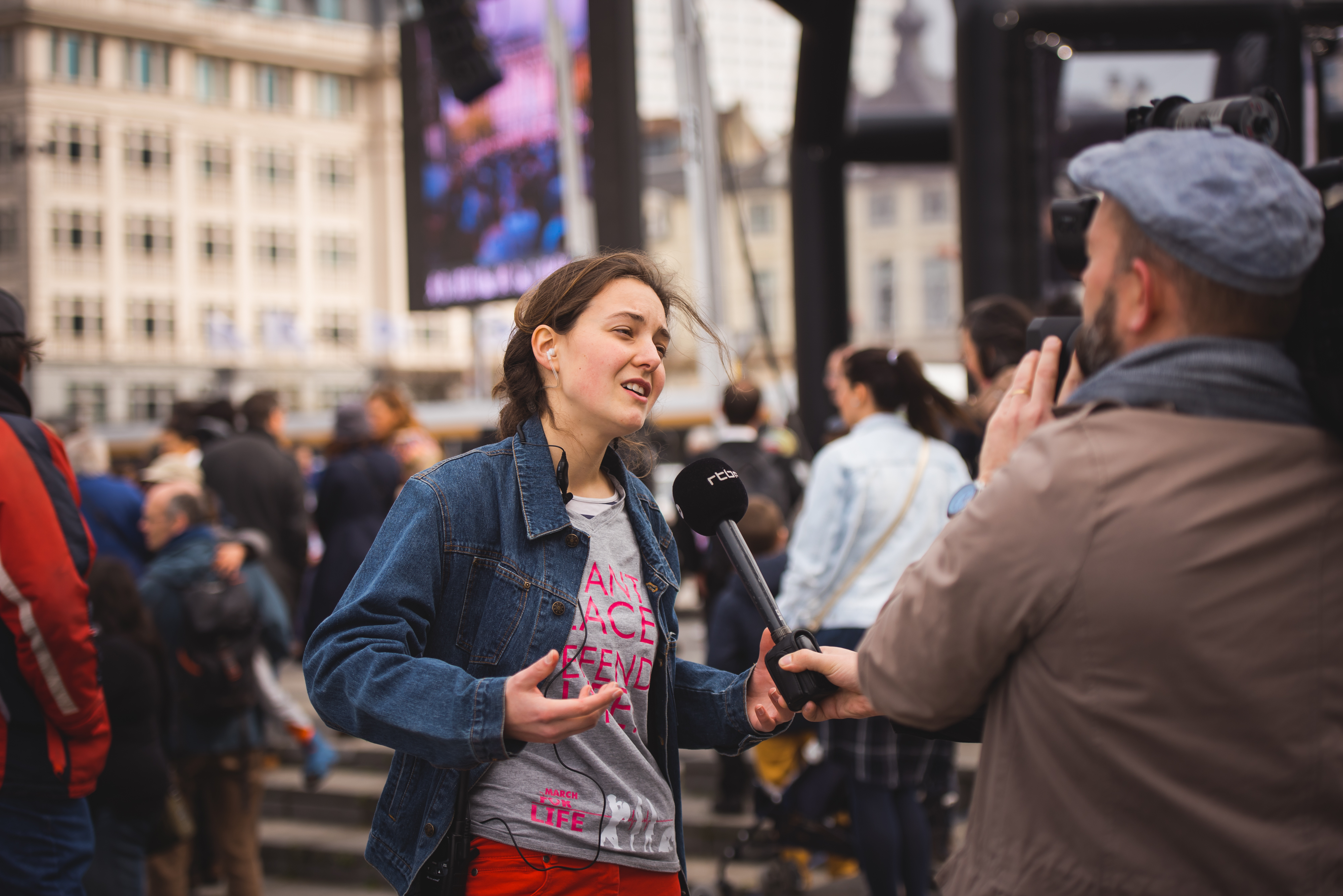 Constance du Bus qui parle au membre de la presse du RTBF lors de la Marche pour la Vie à Bruxelles en 2019